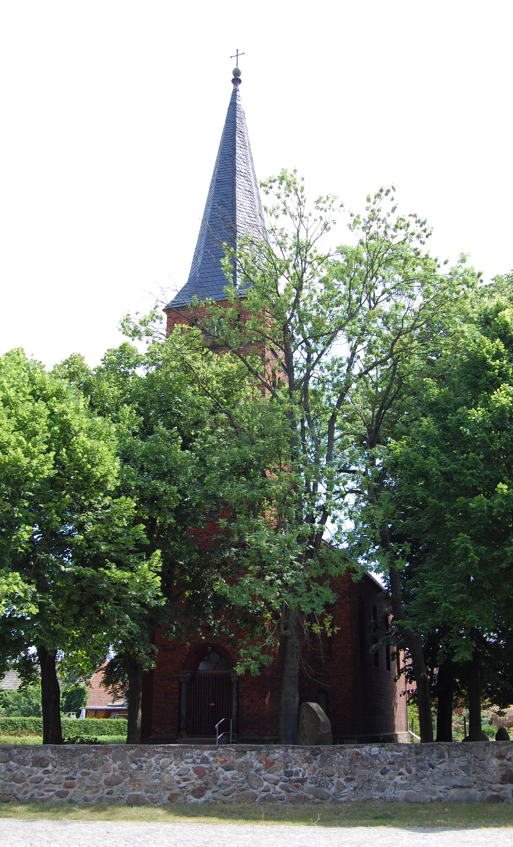 Johanneskirche in Lindhorst